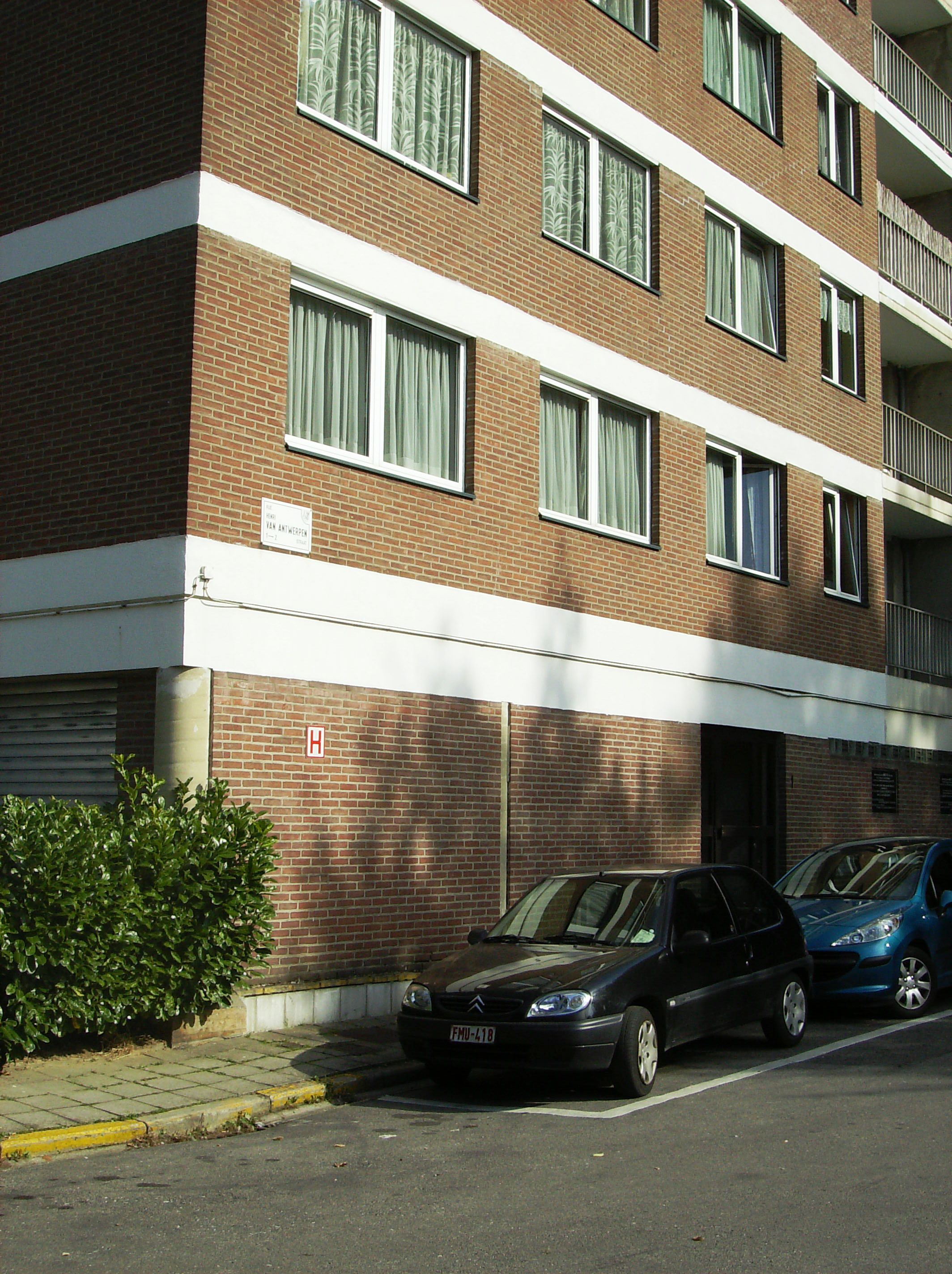 rue Henri van Antwerpen